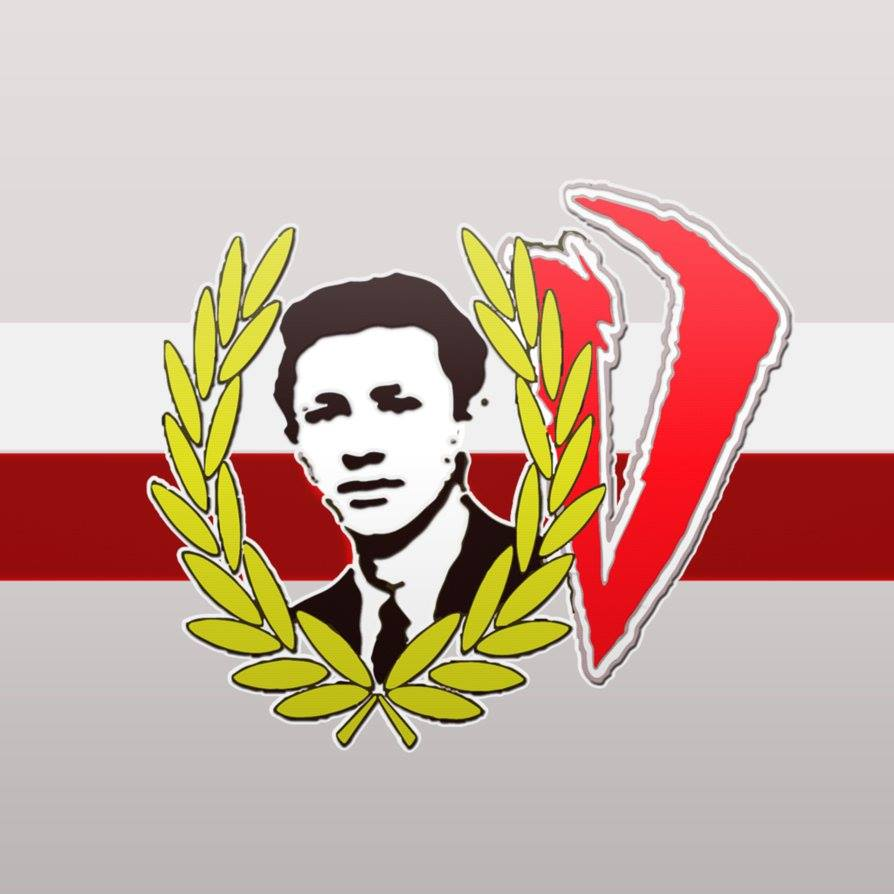 CRB fans Ultras